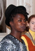 Занеле Мухоли на кинофестивале "Бок о бок"